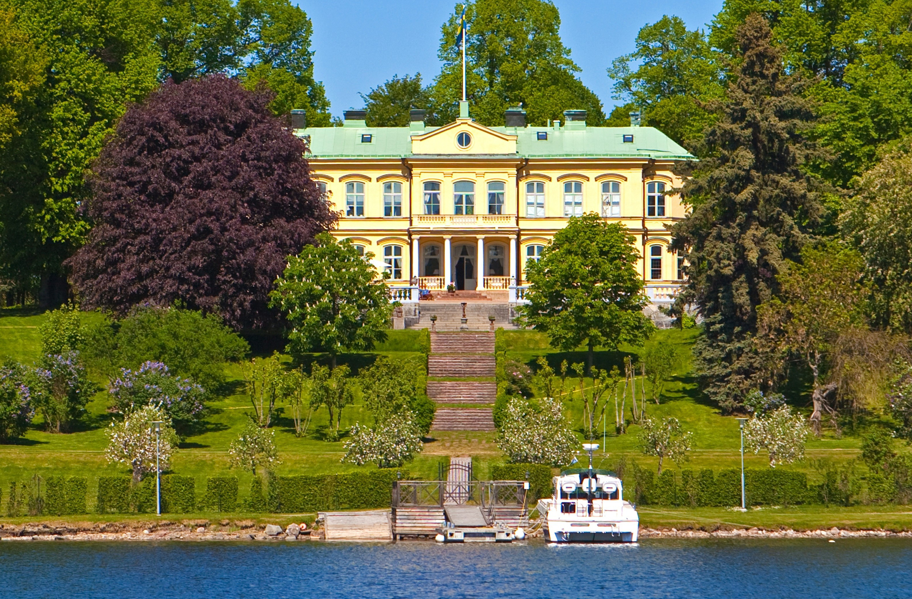 Kevinge gårds huvudbyggnad